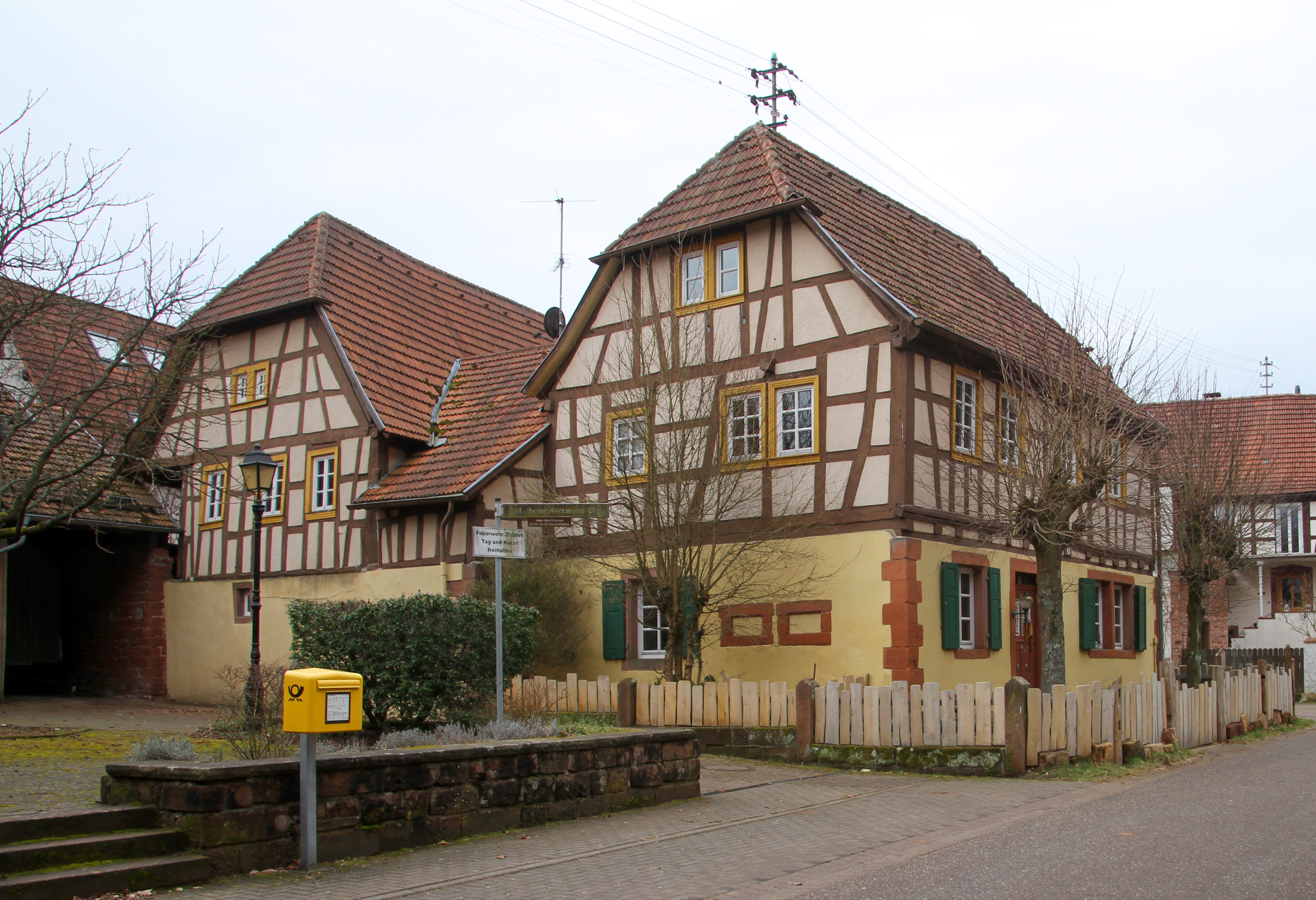 Oberschlettenbach